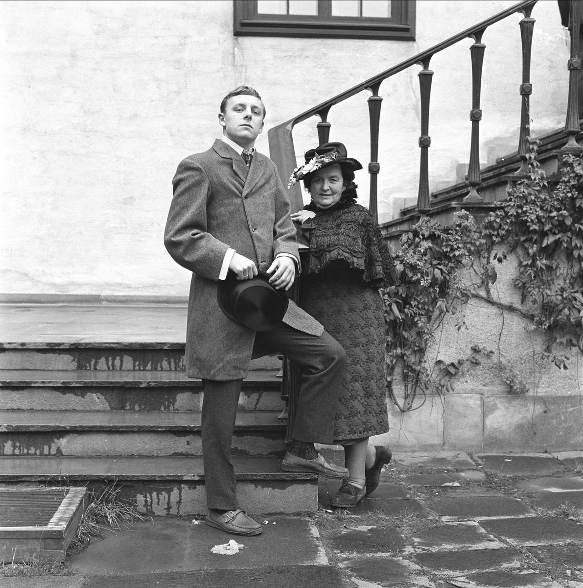 Zinken Hopp og Lennart Aavatsmark i klær fra 1914 på store kavalkade på Bristol, Oslo, 04.09.1964.